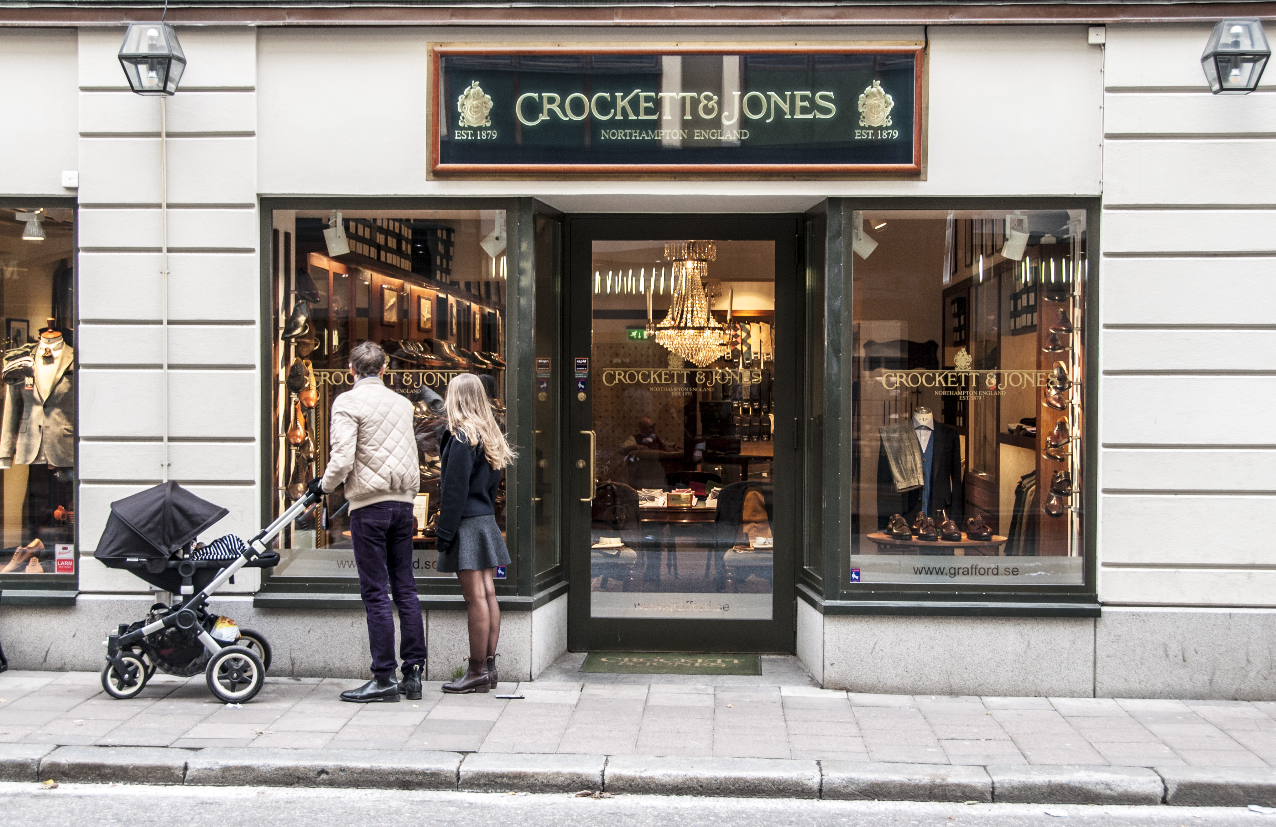 Crockett & Jones, Humlegårdsgatan, Stockholm